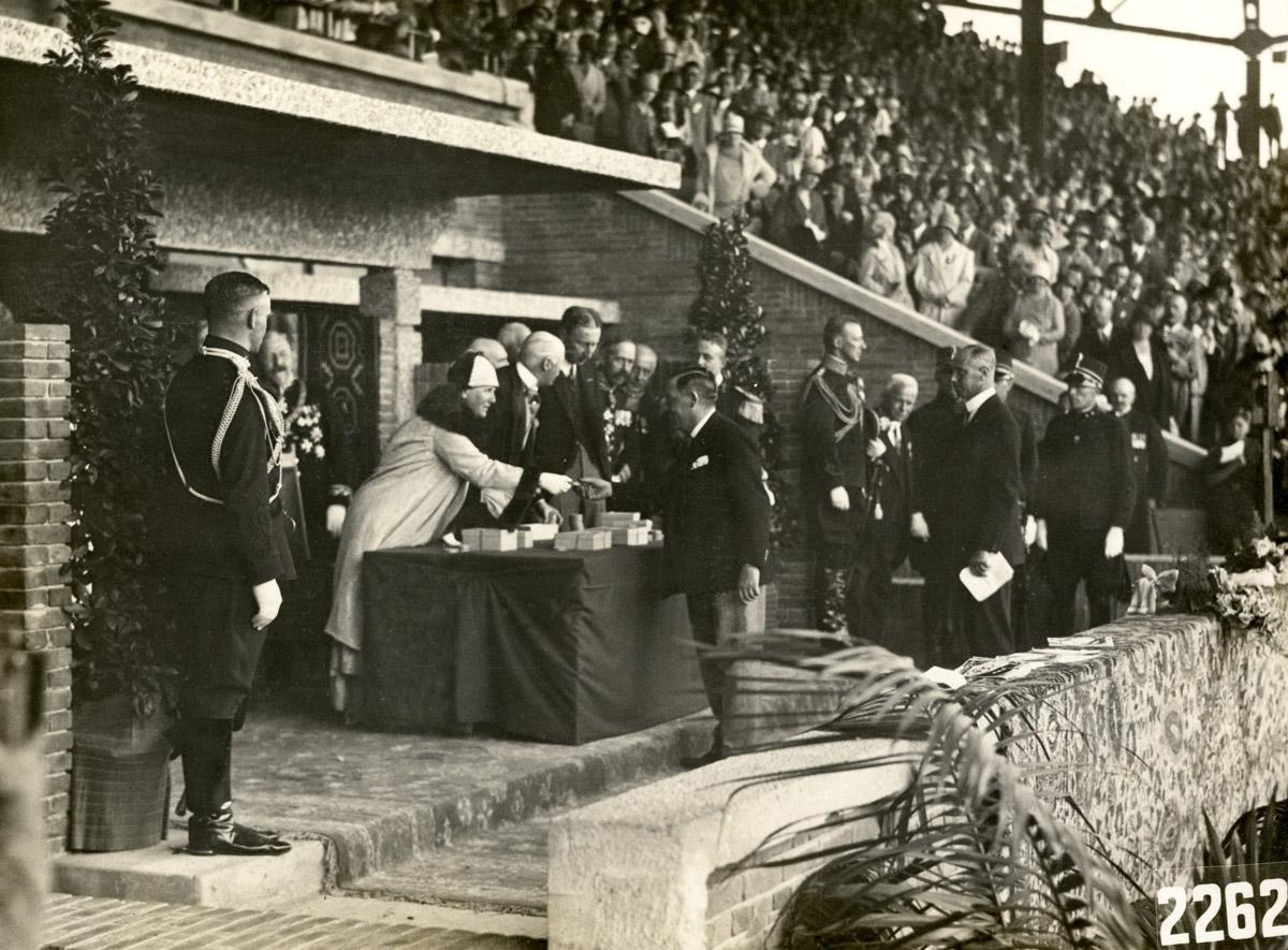 Nederland: Prijsuitreiking goud. Gouden medaille voor Jan Wils (archtiect olympisch stadion). Eerste prijs bouwkunst. Rechts van hem staan de Nederlandse officieren Charles Pahud de Mortanges, P. de Kruyff en A.D.C. van der Voort van Zijp. 1928. photograph.